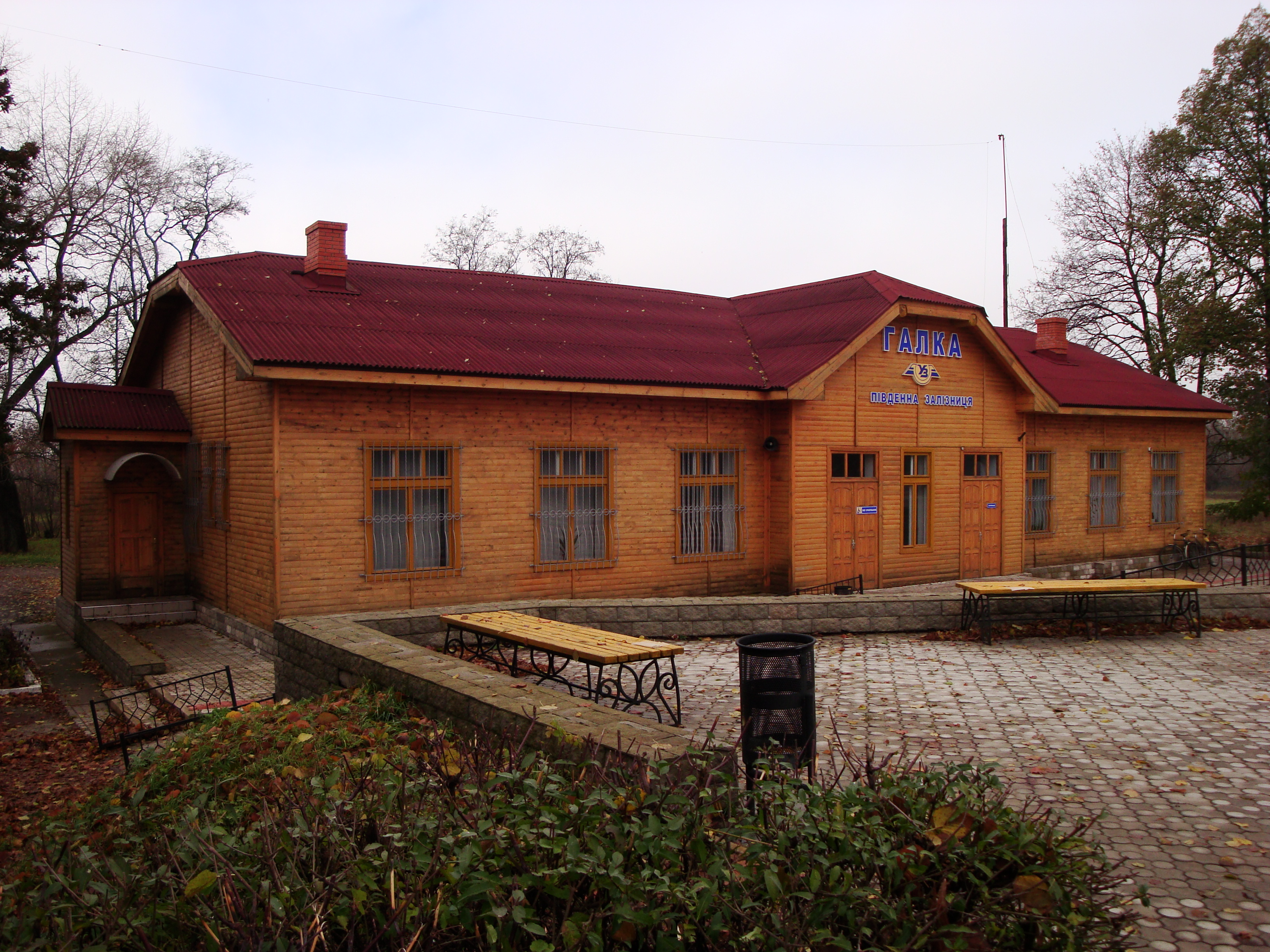 Вокзал станції Галка Південної залізниці